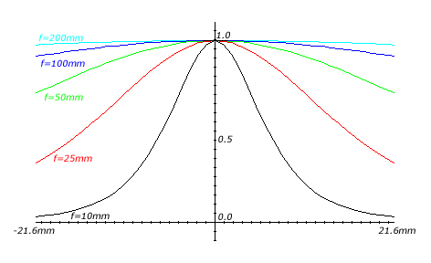 Loi du cos4 pour un format 24 x 36 (diagonale 43,2 mm)